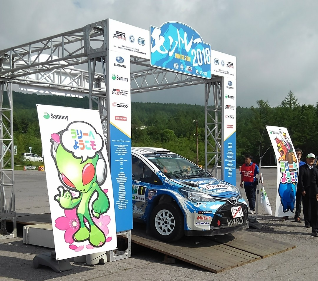 モントレー2018に参戦するOVER DRIVEのヤリス